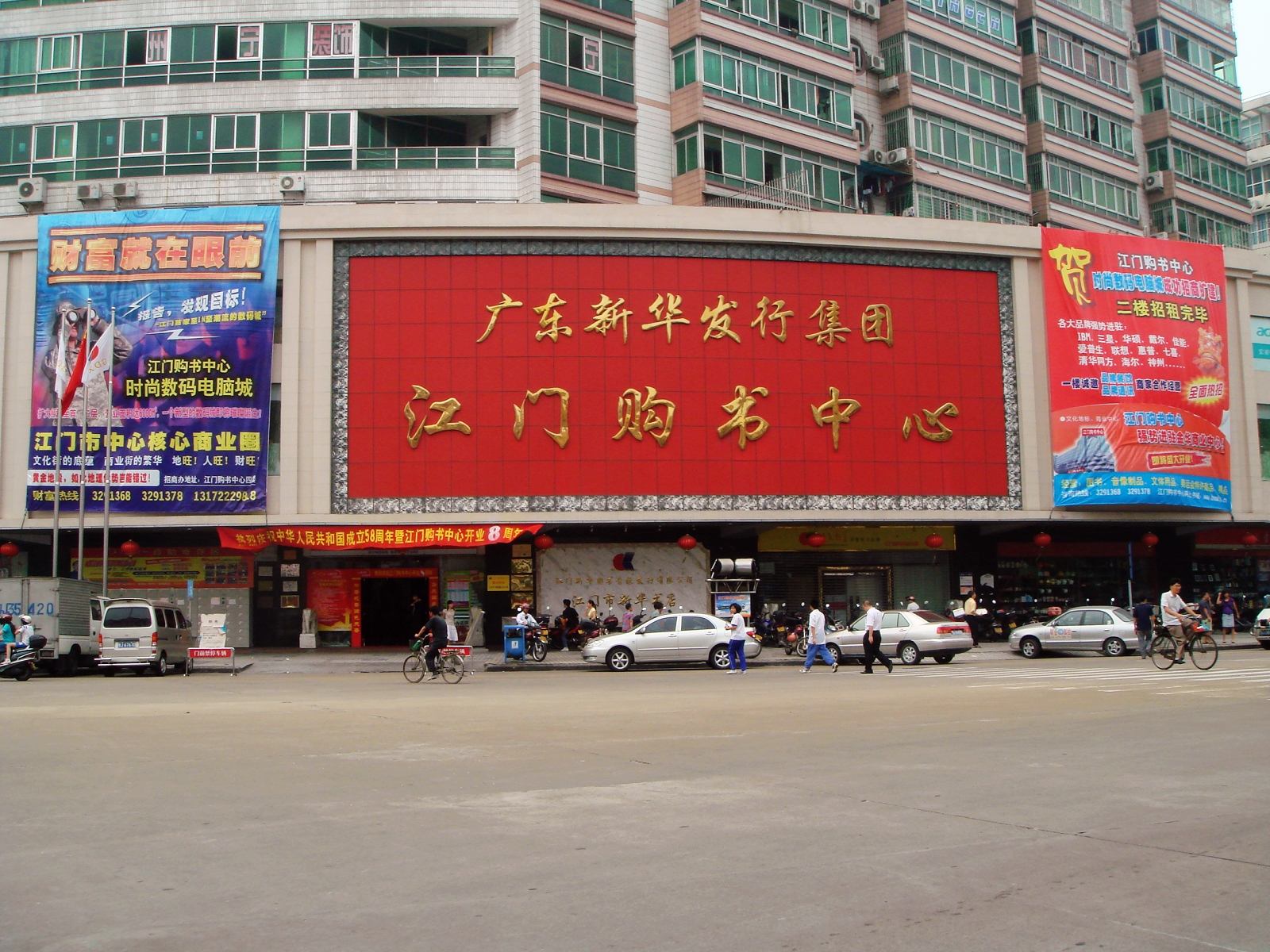 舊江門市購書中心，現為全市最大的「新華電腦城」